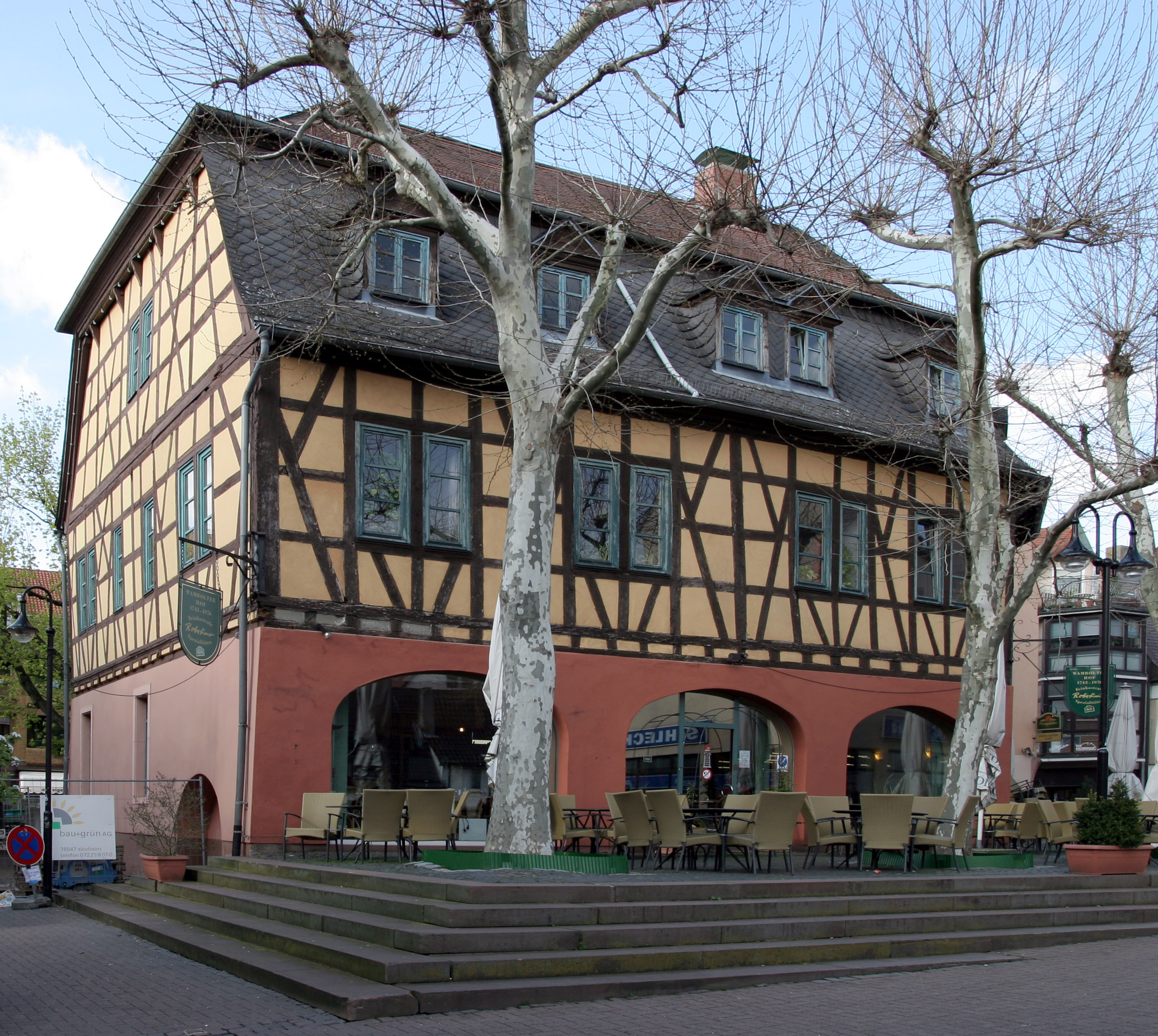 Der Wambolter Hof in Bensheim (Südhessen)